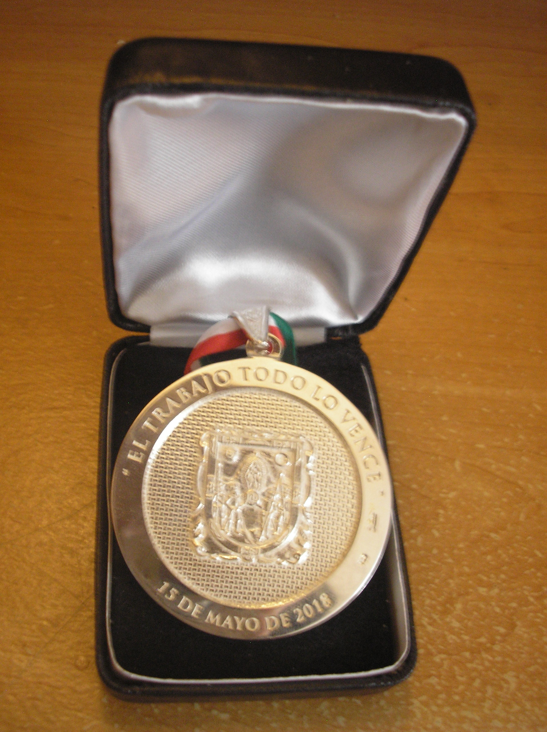 Medalla de Reconocimiento por la Defensa de los Derechos Humanos, el Combate a la Discriminación y la Promoción de la Tolerancia "Gilberto Rincón Gallardo y Meltis", concedida por el H. Congreso del Estado de Zacatecas, por su labor en ayuda y defensa de las personas con discapacidad, desde el ámbito de la inclusión a la vida artística, educativa y cultural.